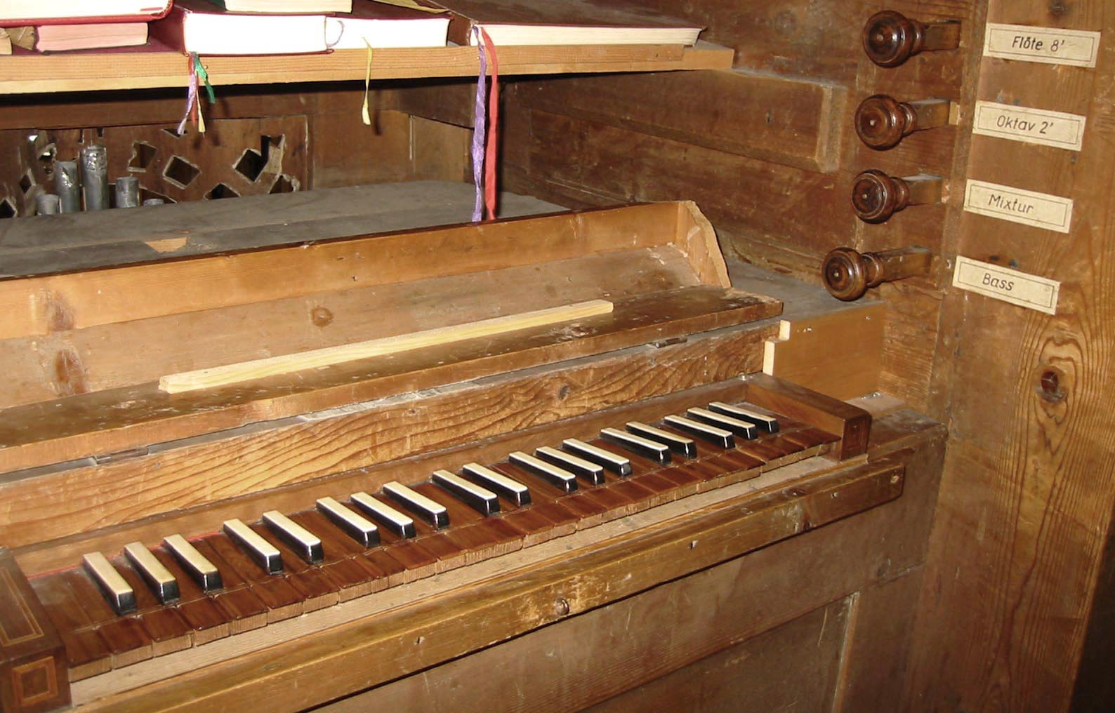 Klaviatur der Orgel in der Kaplaneikirche in Boden, Gemeinde Pfafflar